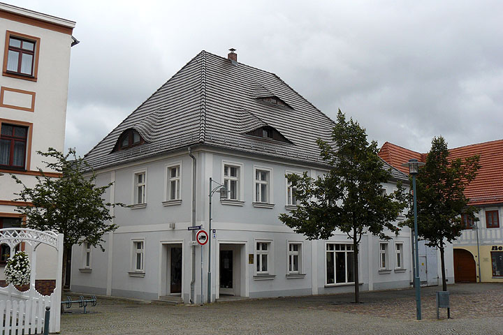 Burglehnhaus in der Langen Straße 31 in Spremberg/ Brandenburg/ Deutschland